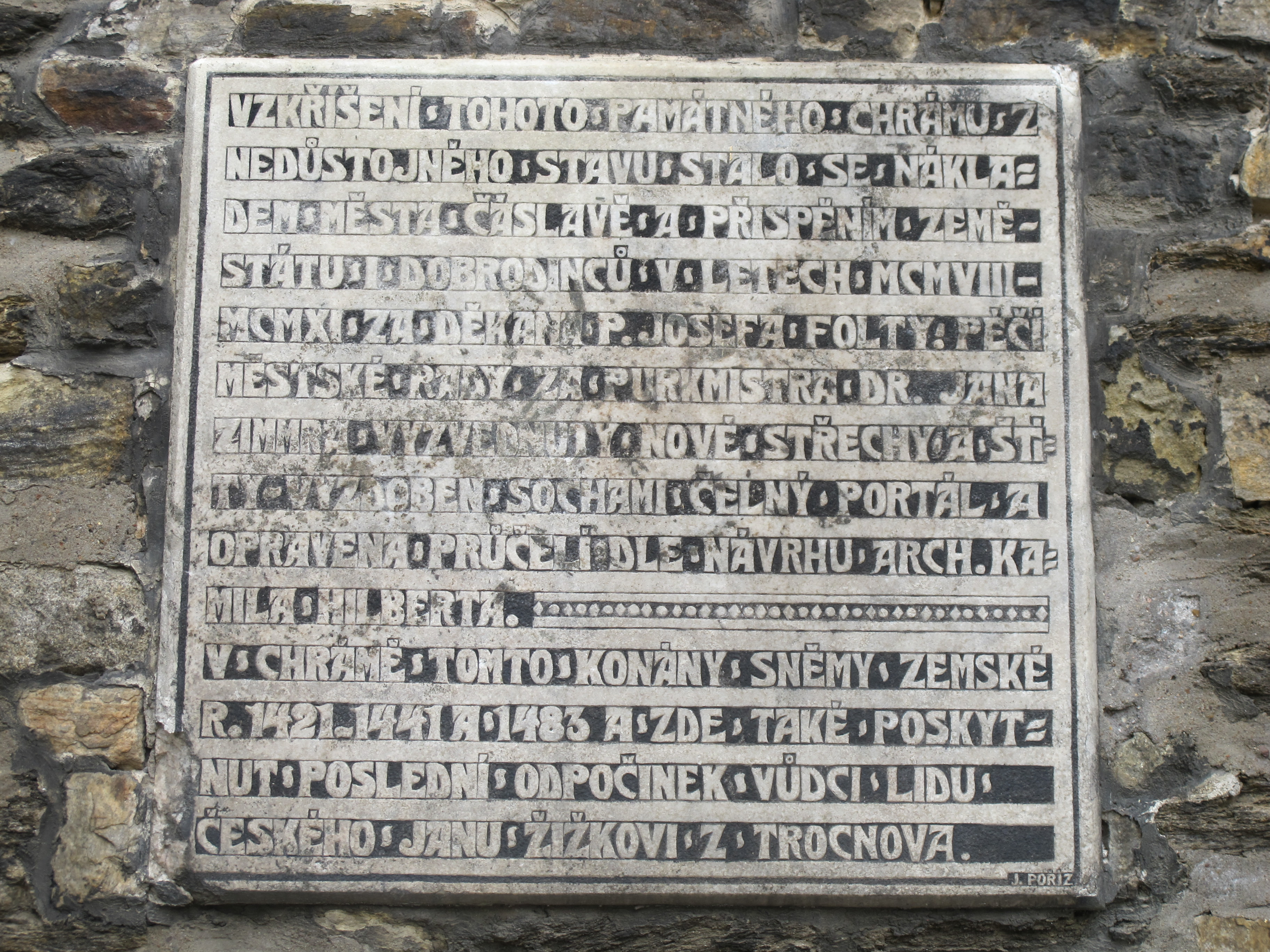 Kostel svatých Petra a Pavla, Čáslav-Staré Město